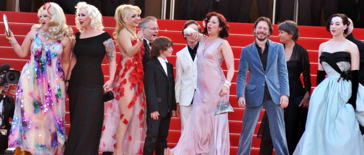 Mathieu Amalric et l'équipe du film Tournée au festival de Cannes. De gauche à droite : Dirty Martini, Mimi Le Meaux, Julie Atlas Muz, Thierry Frémaux (délégué général du Festival de Cannes), Simon Roth, Joseph Roth, Kitten on the Keys, Mathieu Amalric, Véronique Cayla (directrice générale du CNC) et Evie Lovelle.